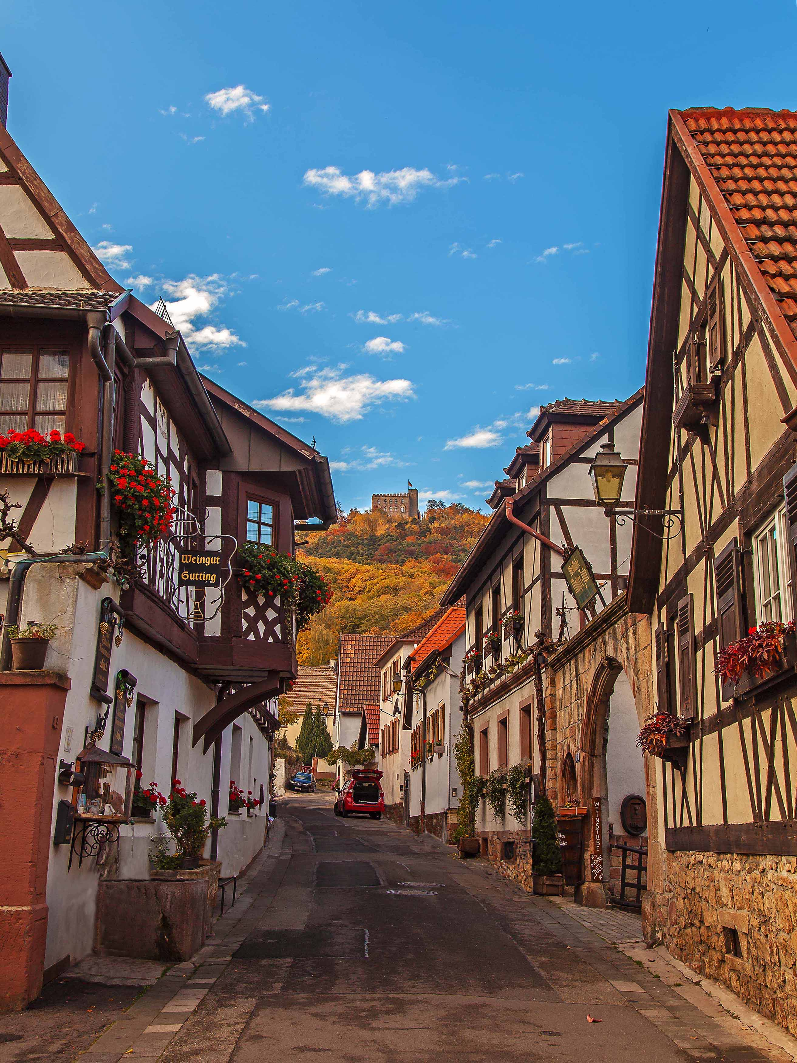 Hambach, Schloßgasse mit Hambacher Schloß